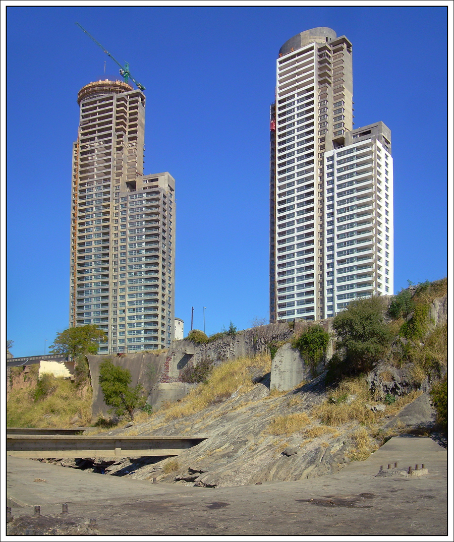 Fotografía tomada el día 08 de mayo de 2009.